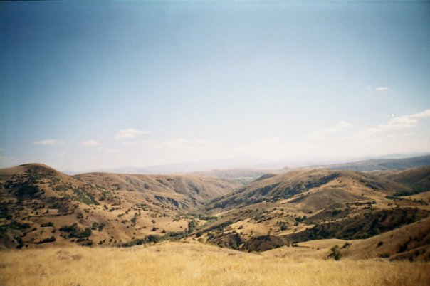 Tarlalardan görünüm.